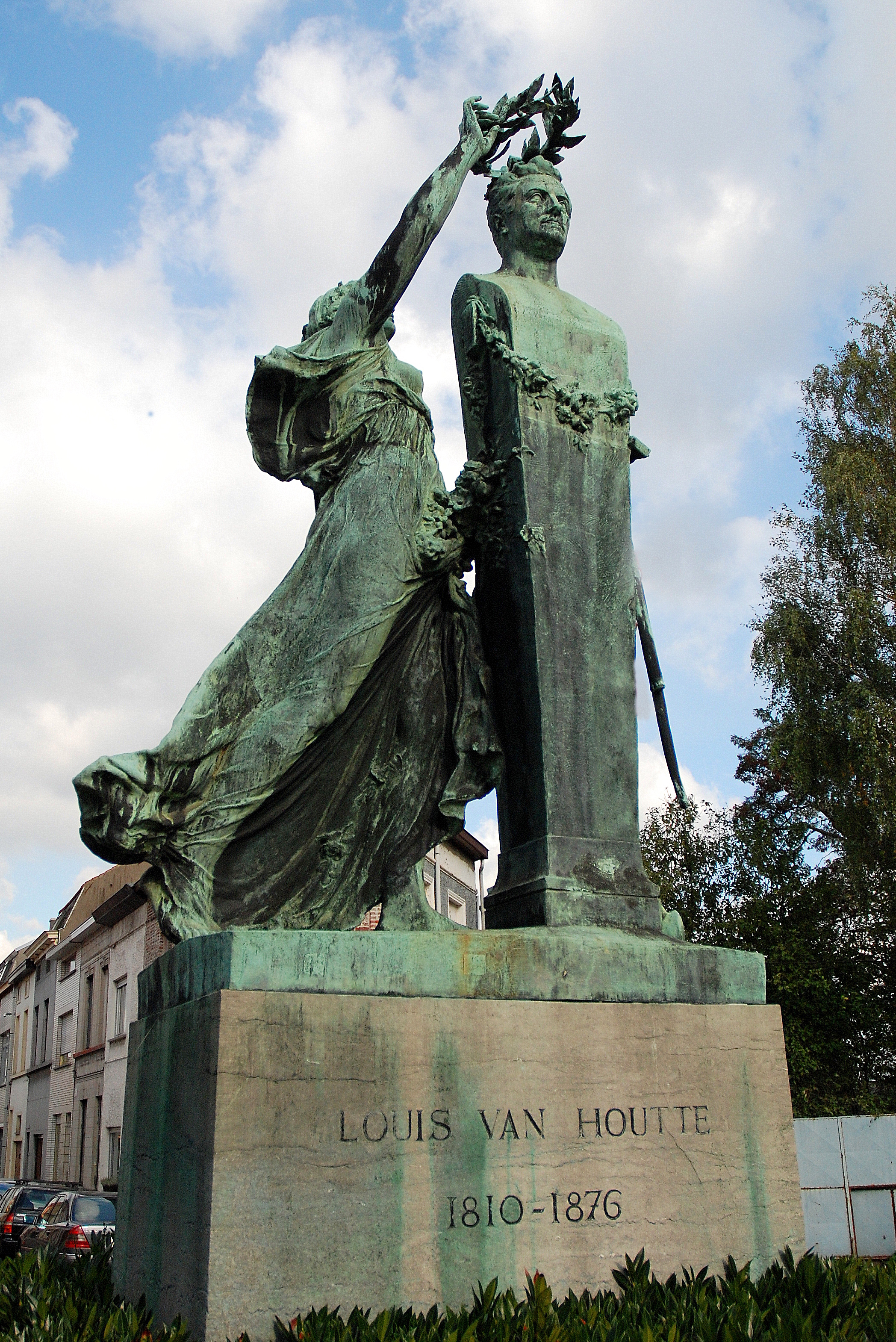 standbeeld van Louis Van Houtte te Gentbrugge in de Louis Van Houttestraat, vervaardigd door Paul De Vigne, ter gelegenheid van de viering van de 100e verjaardag van Van Houtte